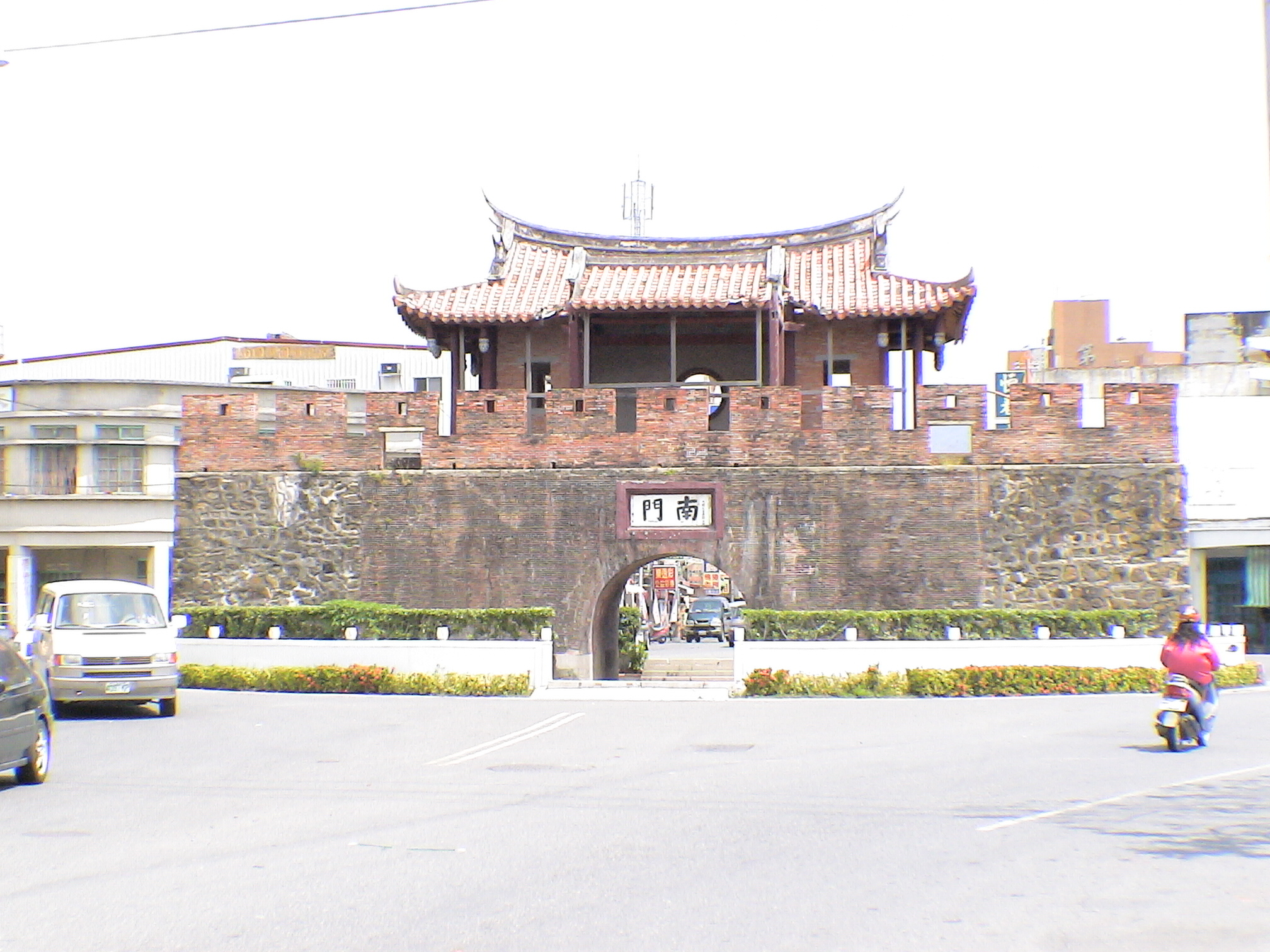 恆春縣城南門。